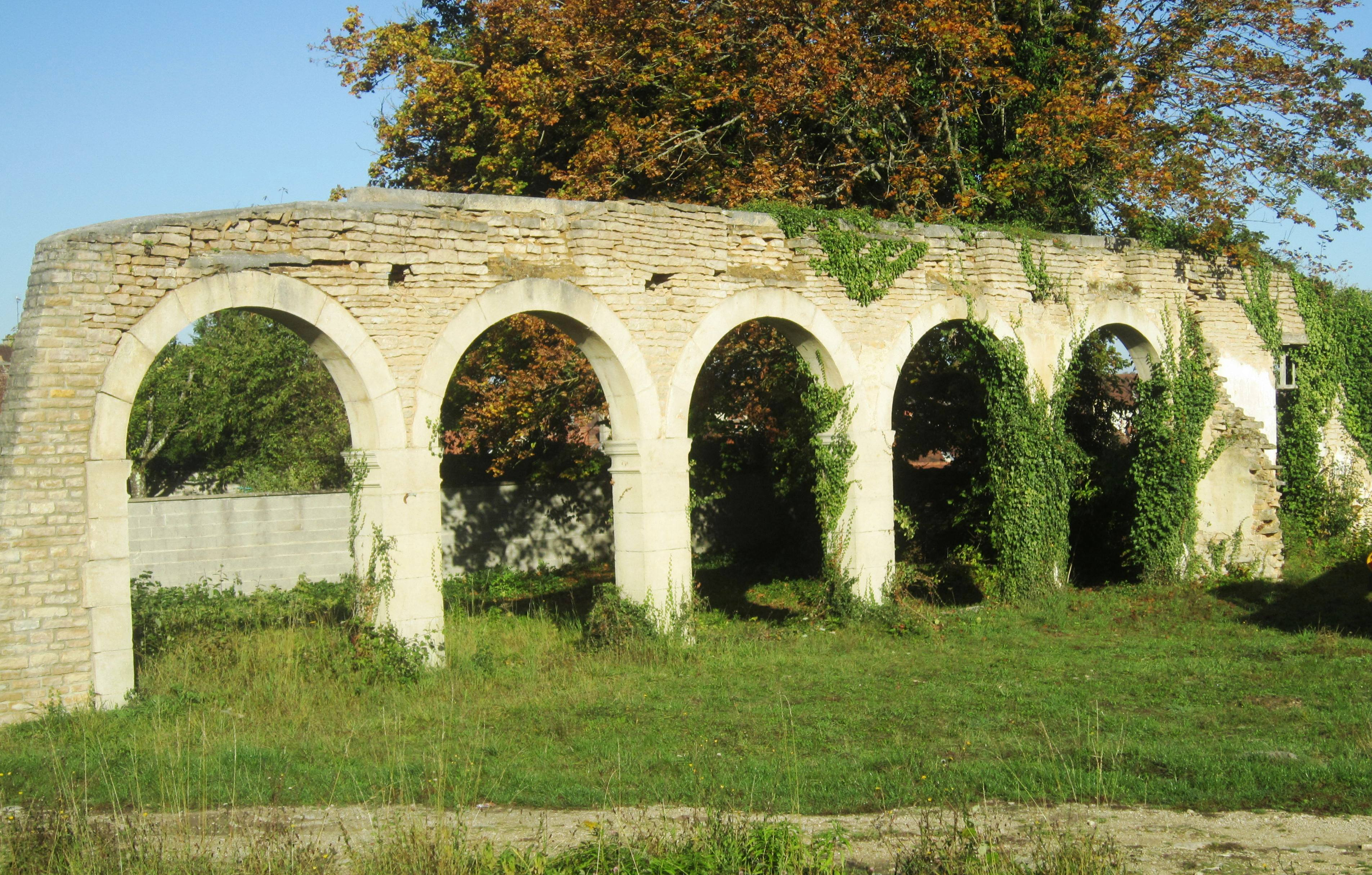 Vestige d'un cloître dans le quartier des Ursulines à Châtillon-sur-Seine